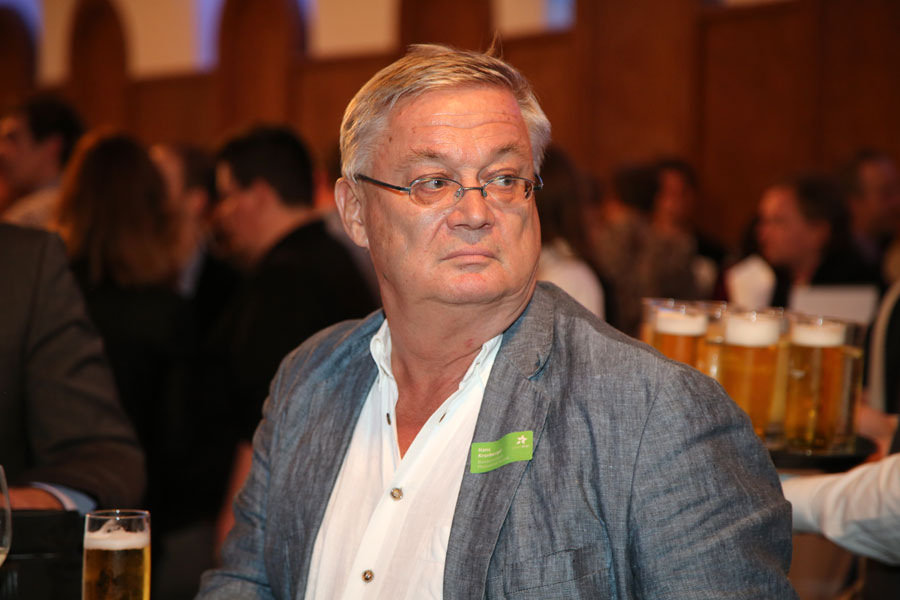 Kronberger.Hans-0489